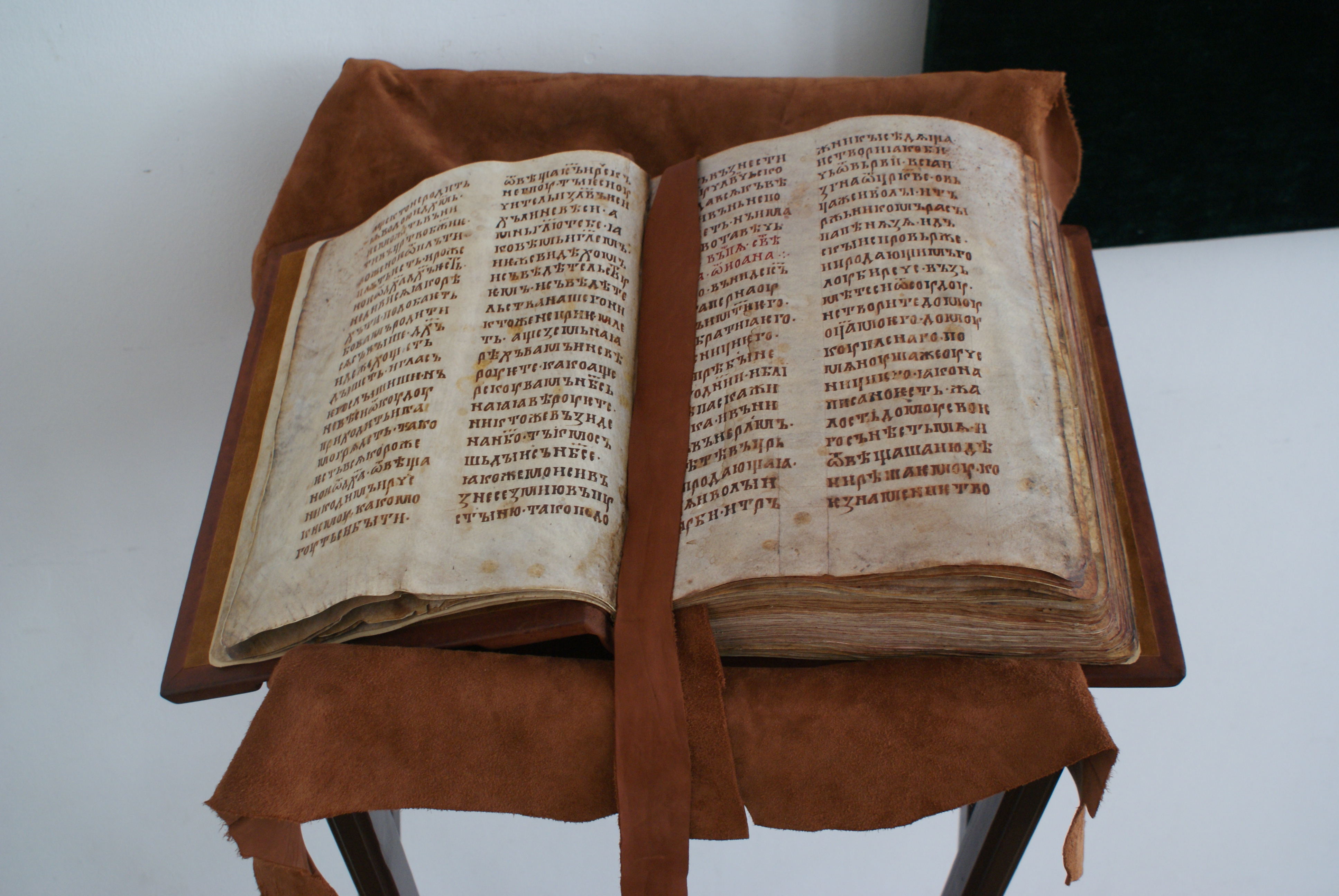 Полацкае Евангелле. Факсімільнае выданне